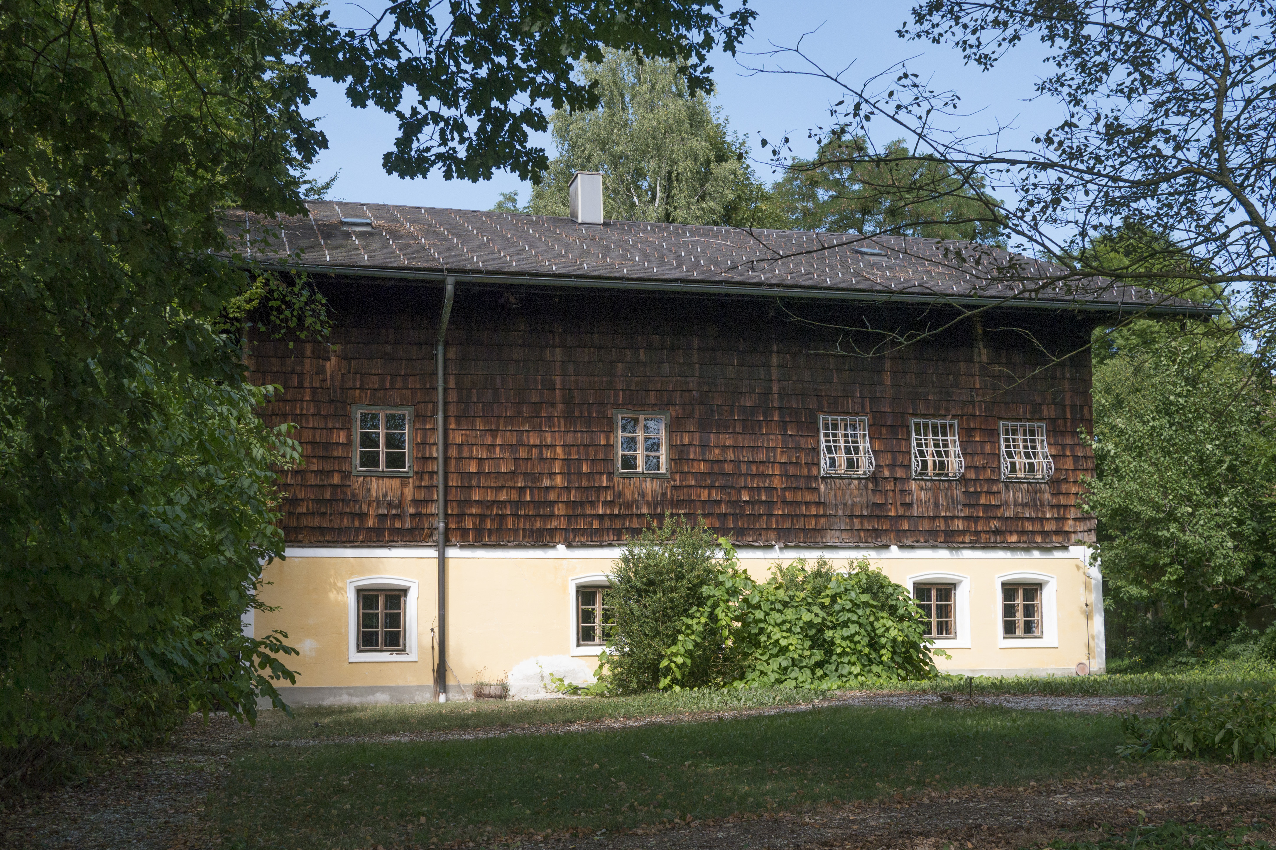 Ehem. Pfarrhof